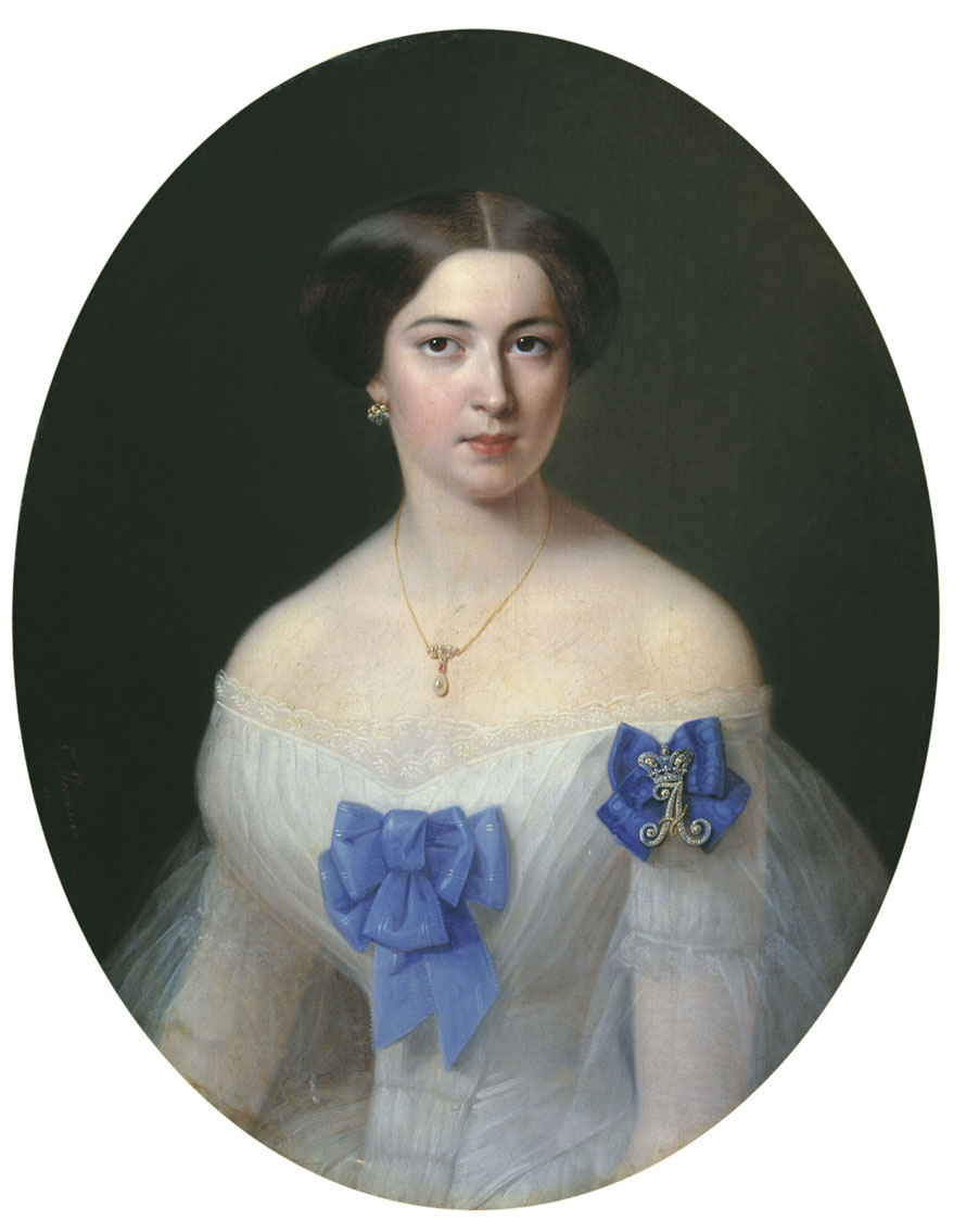 Портрет фрейлины Александры Павловны Александровой (в замужестве Львовой)